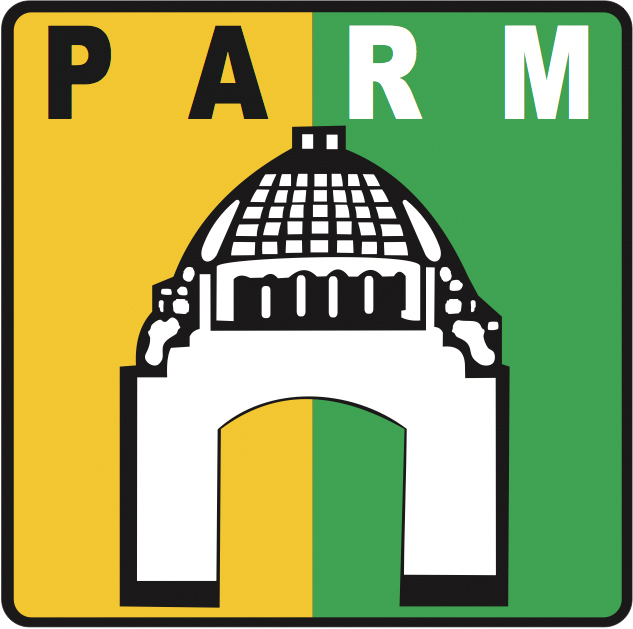 logotipo PARM, Authentic Party of the Mexican Revolution